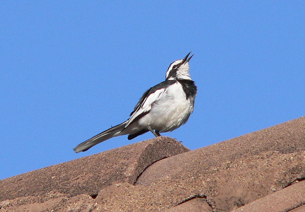 Photograph taken by Christiaan Kooyman on 23 December 2005 in Nanyuki, Kenya.